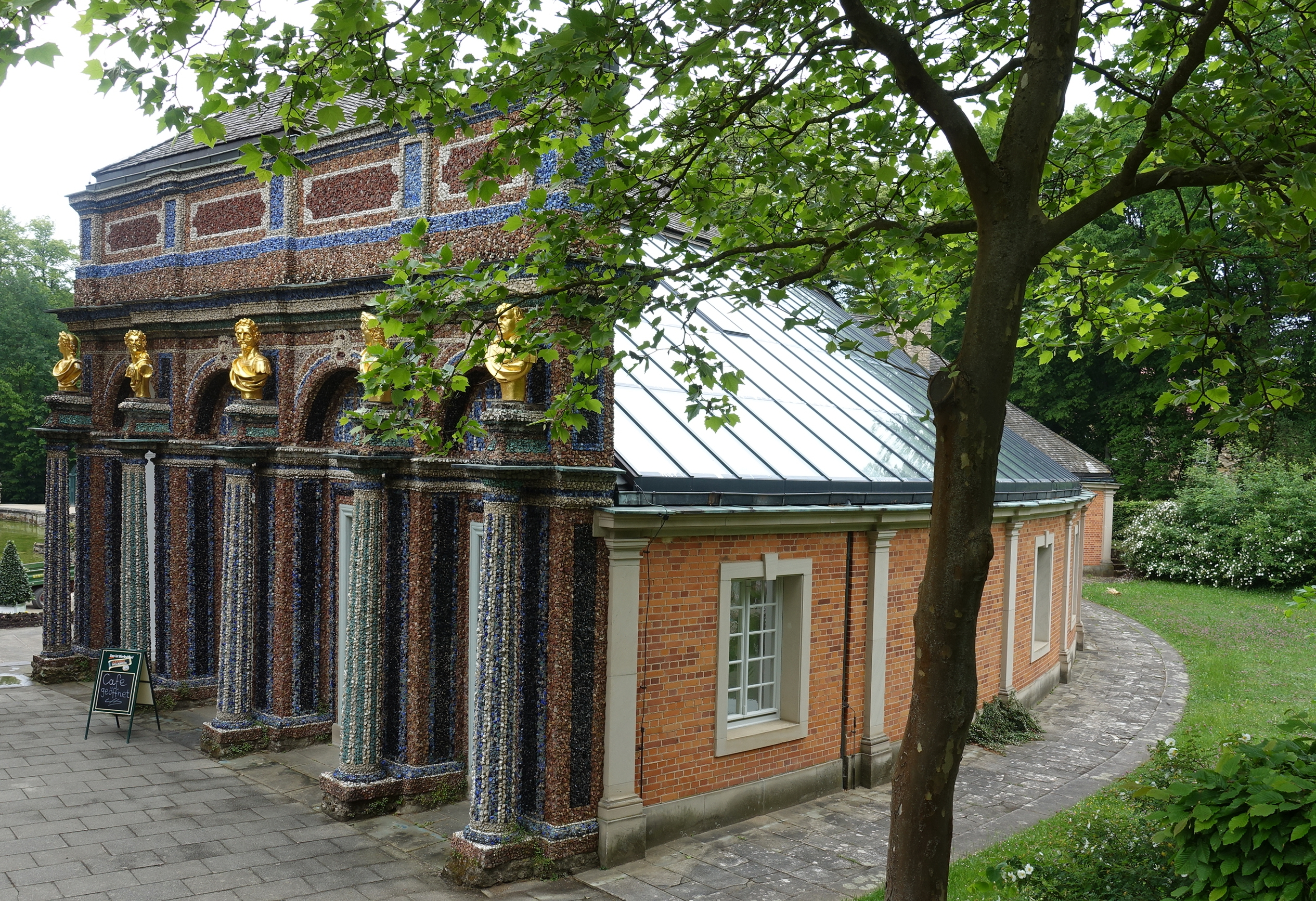 Rückseite der Arkaden des Neuen Schlosses (Eremitage Bayreuth)